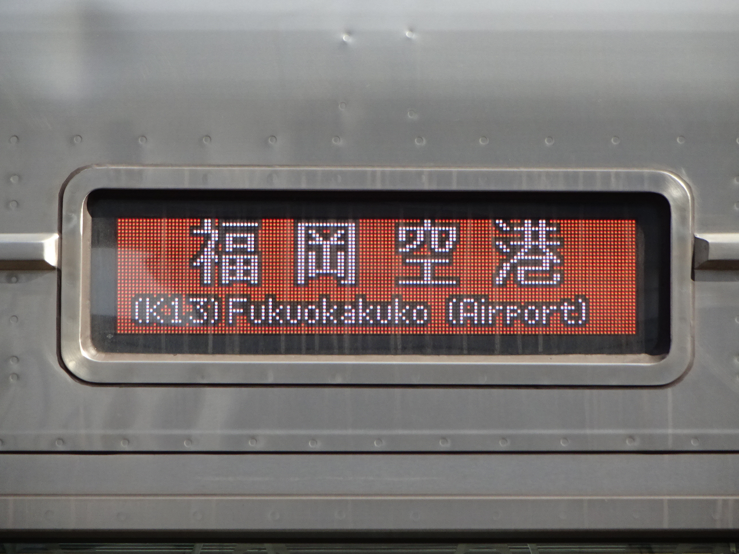 福岡市交通局2000系 フルカラー行先表示器 姪浜駅にて撮影